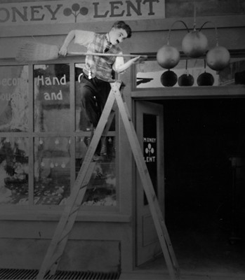 fotografía de la película The Pawnshop de 1916